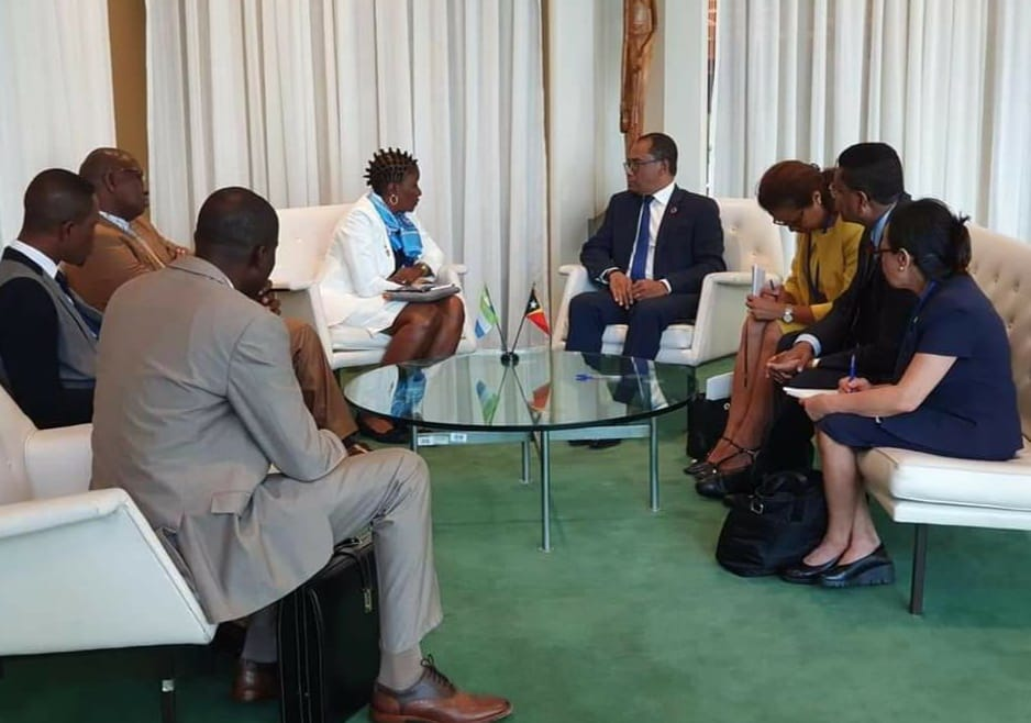 Osttimors Außenminister Dionísio Babo trifft Sierra Leones Außenministerin Nabeela Tunis